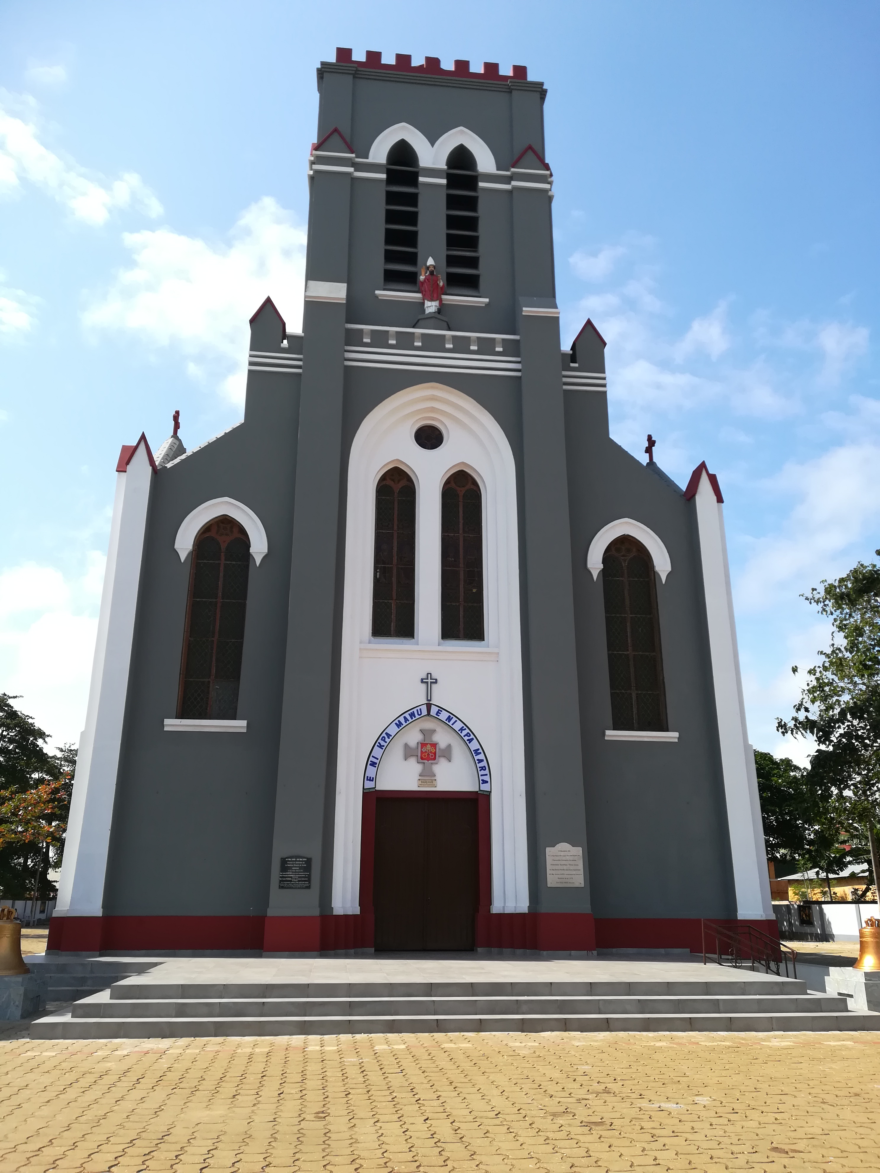 Basilique de Ouidah E NI KPA MAWU, E NI KPA MARIA en face du temple de Python Wikidata has entry La Basilique de OUIDAH with data related to this item.